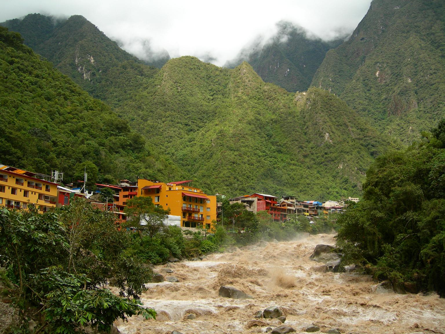 Aguas Calientes vista desde la carretera que lleva a Machu Picchu